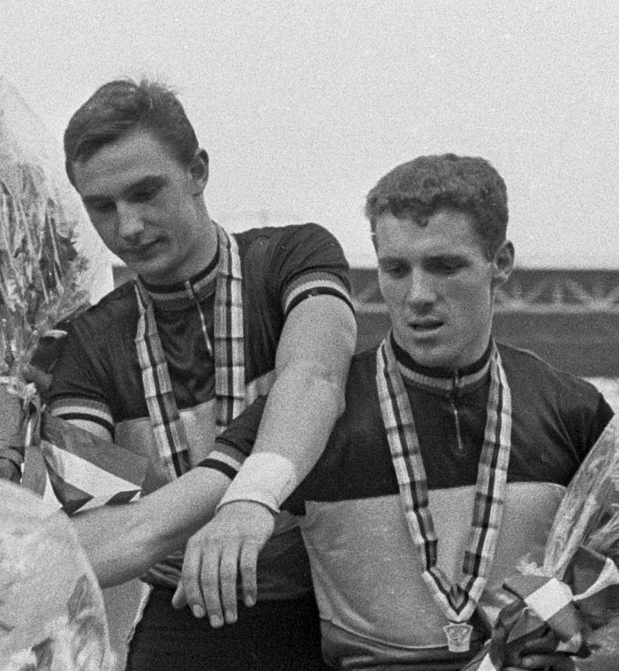 WK Wielrennen op de baan Amsterdam. Ceremonie tandem.